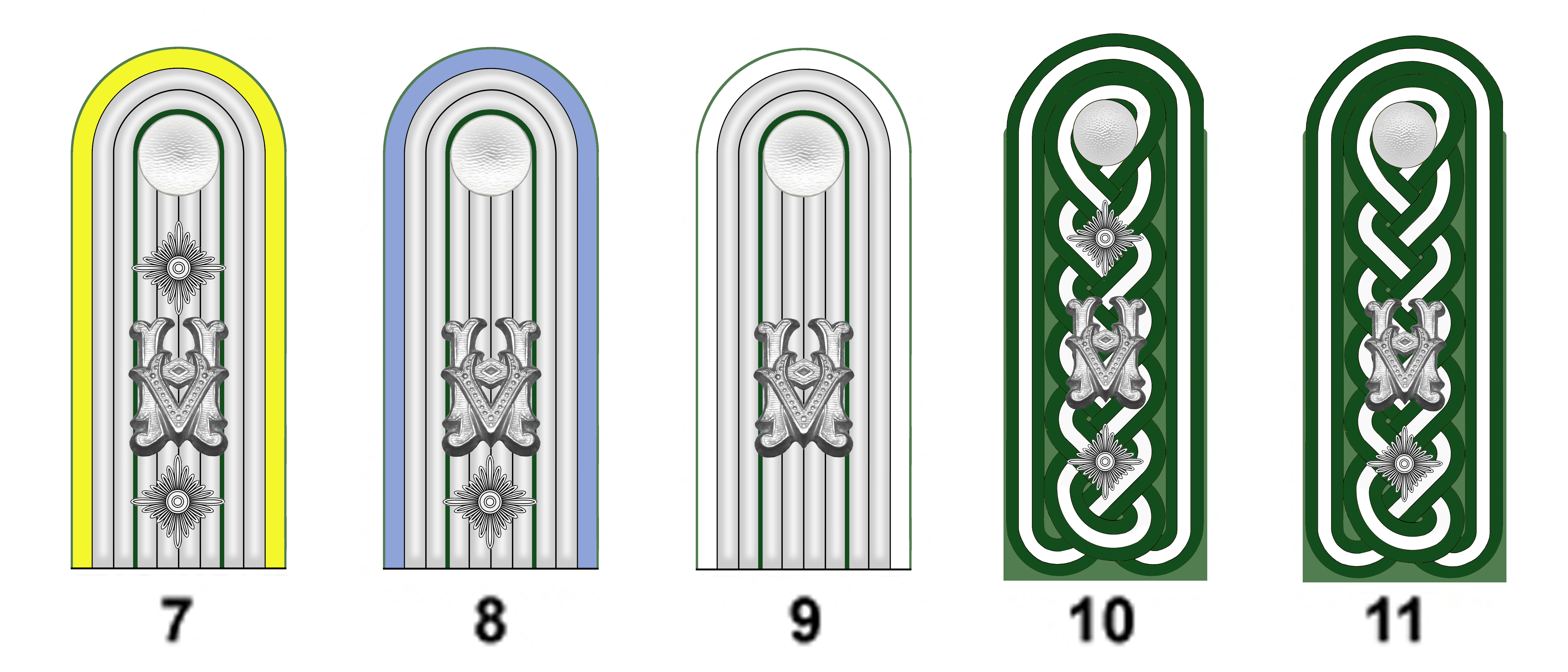 Insignia of German "Heeresbeamte" Beispiele: Stabsapotheker (7) Heeresjustizinspektor (8) Waffenmeister (9) Heereswerkmeister (10) Magazinmeister (11).